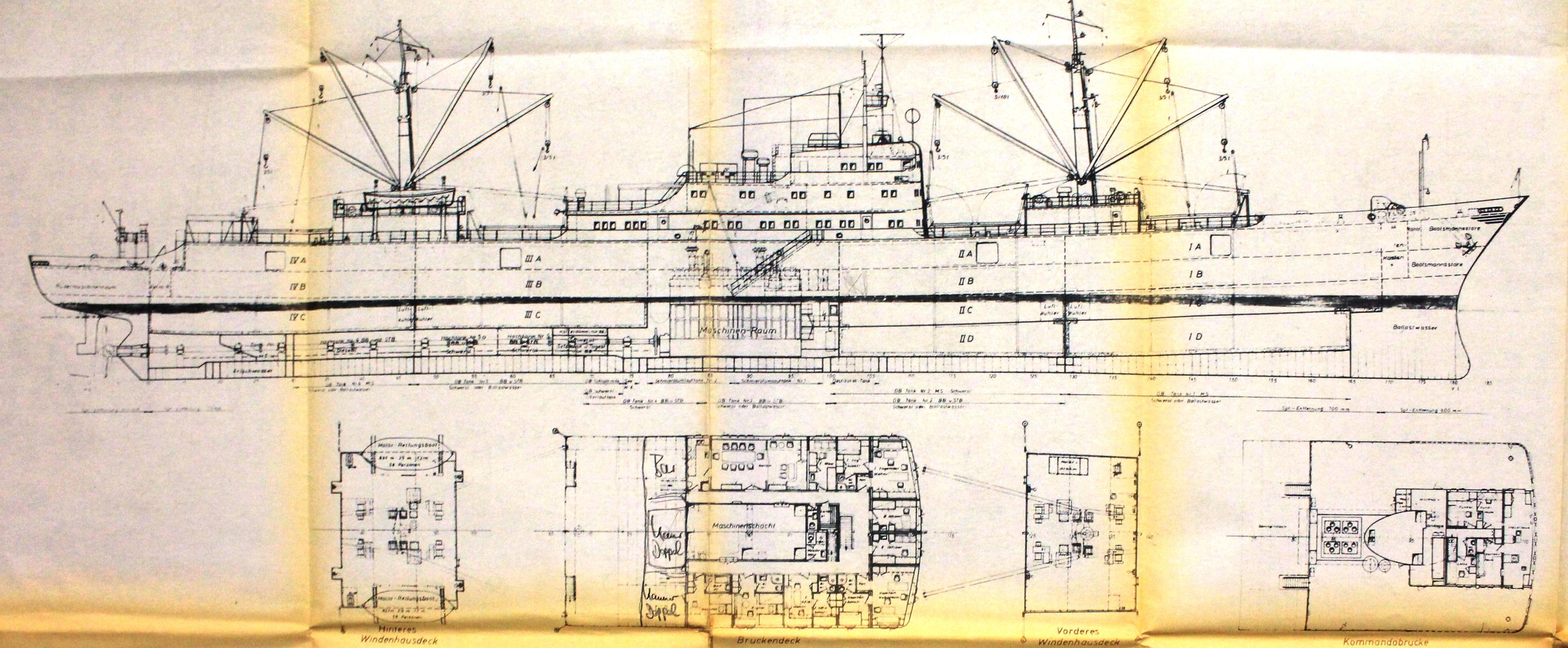 Generalplan eines Hamburger Kühlschiffes